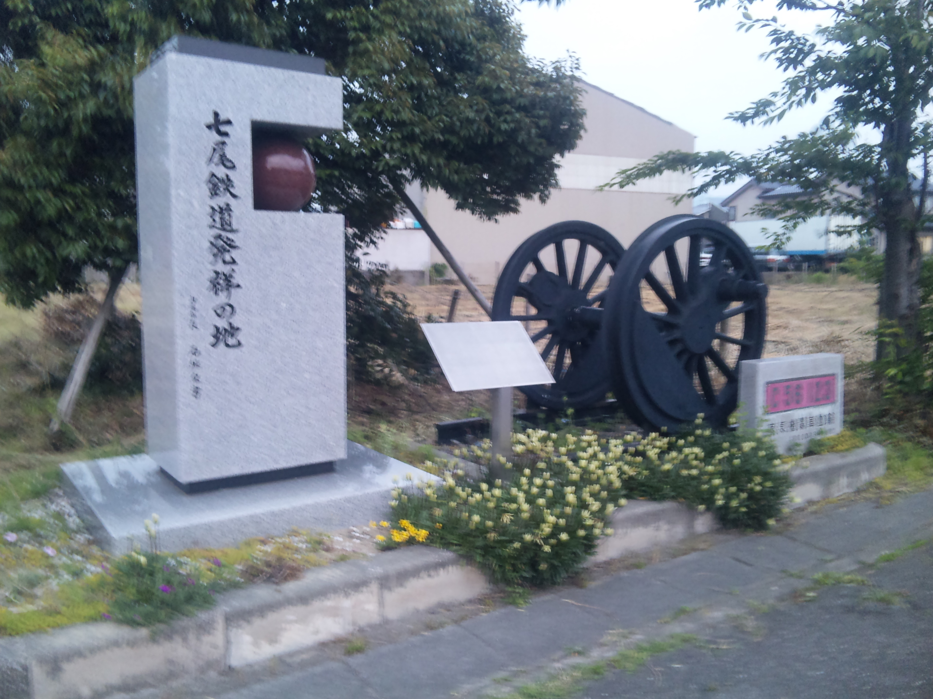 矢田新駅跡地